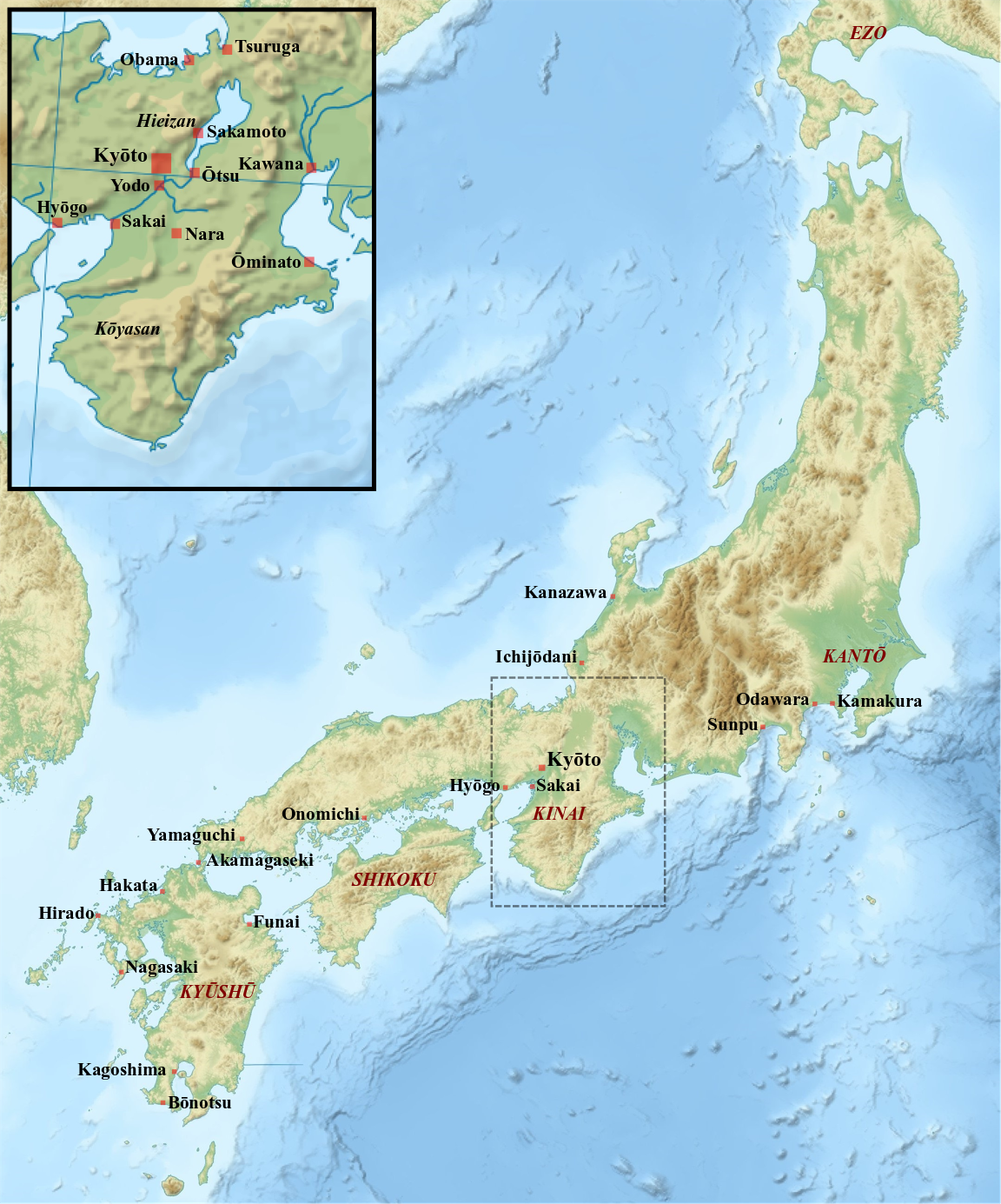 Localisation des principales agglomérations du Japon de l'époque Sengoku (ca. 1450-1600).